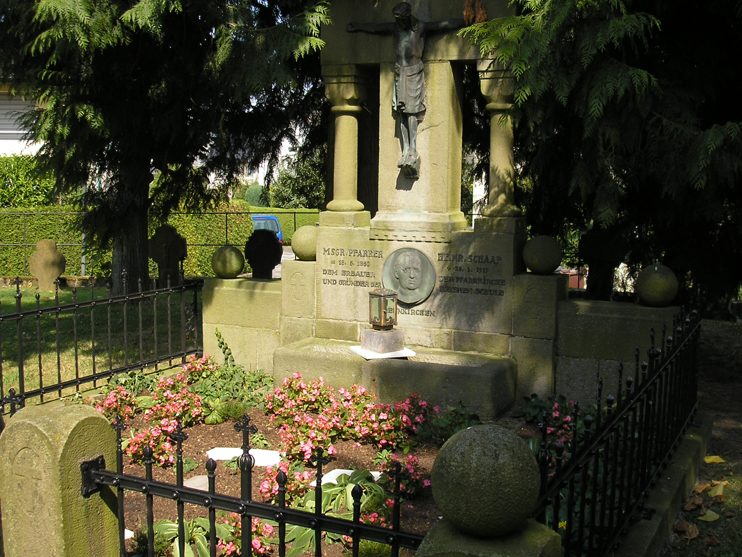 Neunkirchen-Seelscheid, Grabmal Msgr. Pfarrer Heinrich Schaaf, dem Erbauer der Pfarrkirche St. Margareta in Neunkirchen.